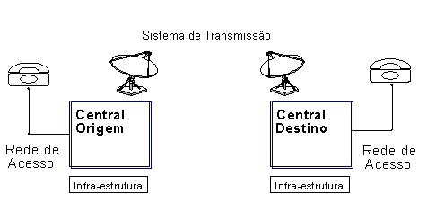 Sistemas de Telecomunicações: esquema prático da rede de telefonia fixa. Abril de 2006.